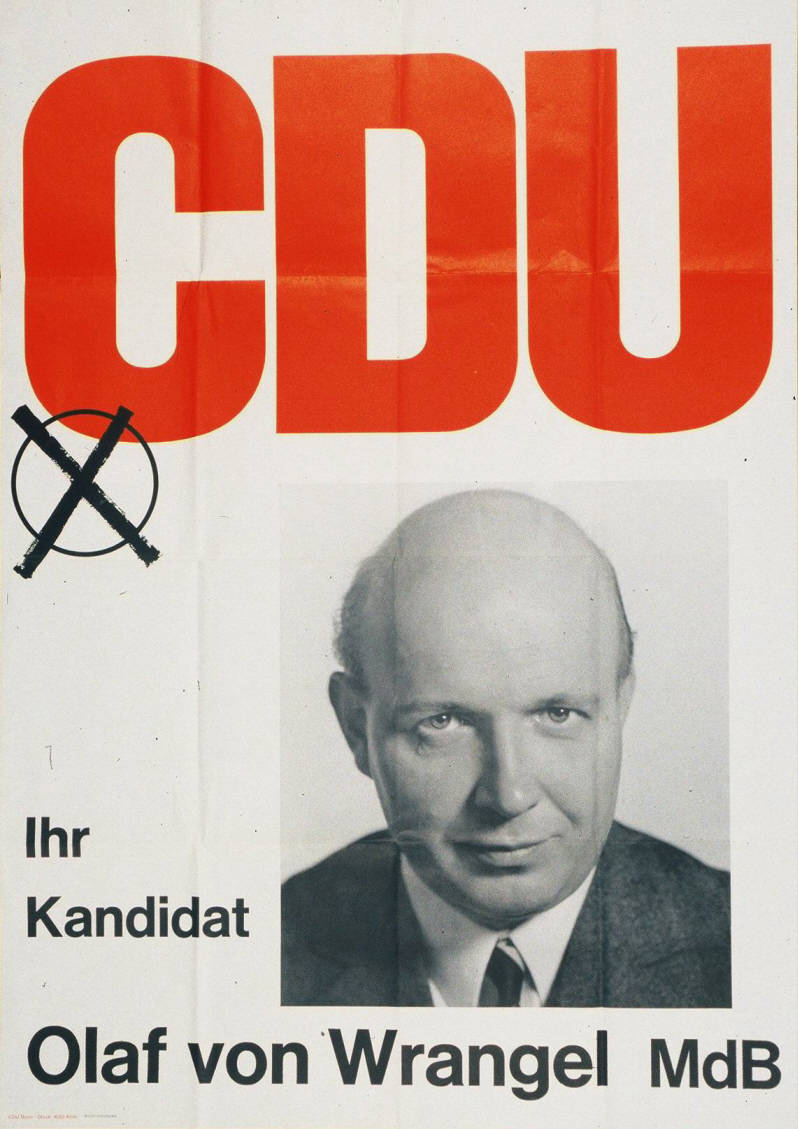 CDU Ihr Kandidat Olaf von Wrangel MdB Abbildung: Porträtfoto - Stimmkreuz Plakatart: Kandidaten-/Personenplakat mit Porträt Auftraggeber: CDU Bonn Drucker_Druckart_Druckort: KVD Köln Wolff, Flensburg Objekt-Signatur: 10-001: 1479 Bestand: Plakate zu Bundestagswahlen (10-001) GliederungBestand10-18: Plakate zu Bundestagswahlen (10-001) » Die 6. Bundestagswahl am 28. September 1969 » CDU » Mit Porträtfoto Lizenz: KAS/ACDP 10-001: 1479 CC-BY-SA 3.0 DE